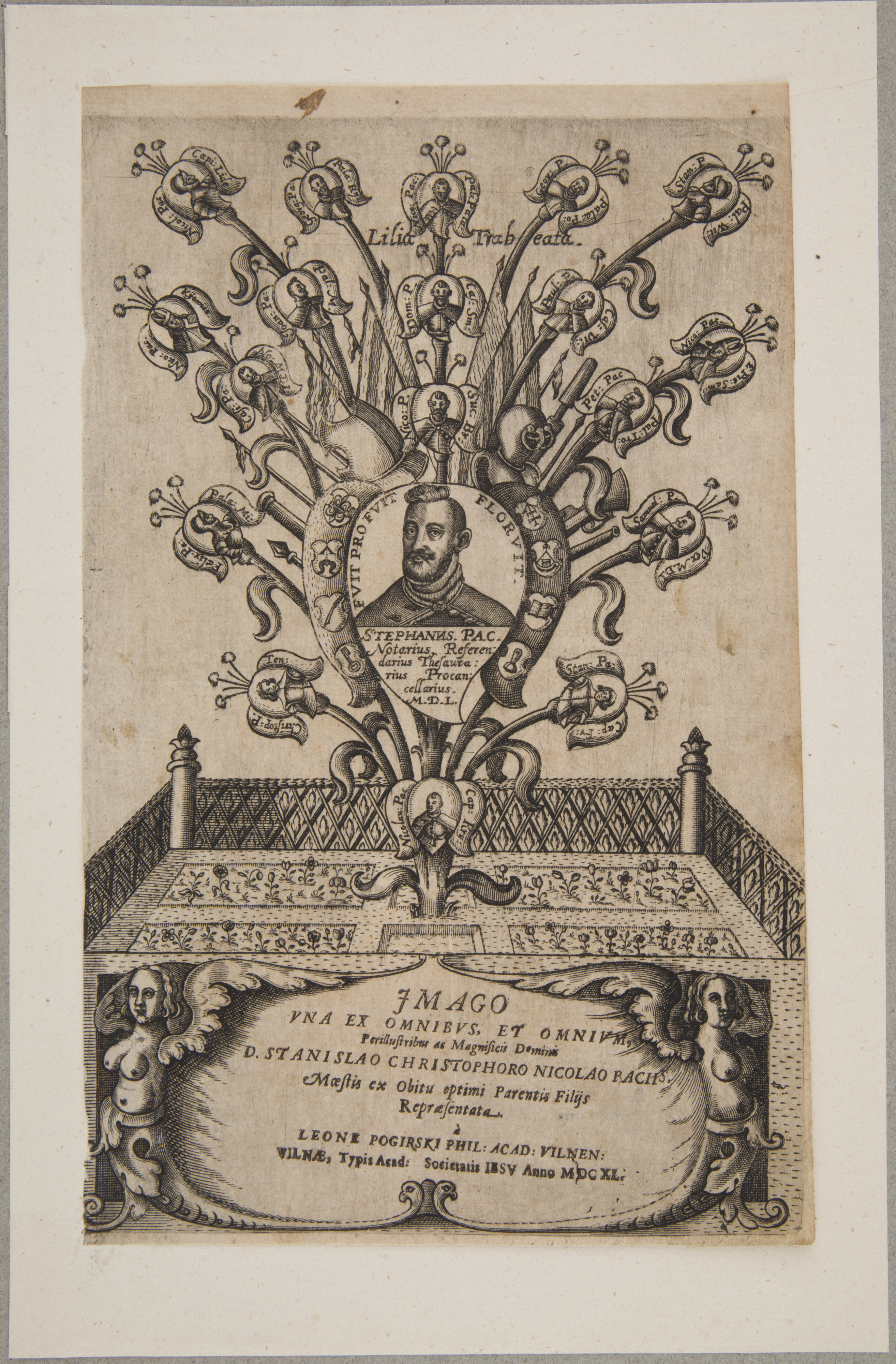 Беларуская (тарашкевіца): Радавод Стэфана Паца